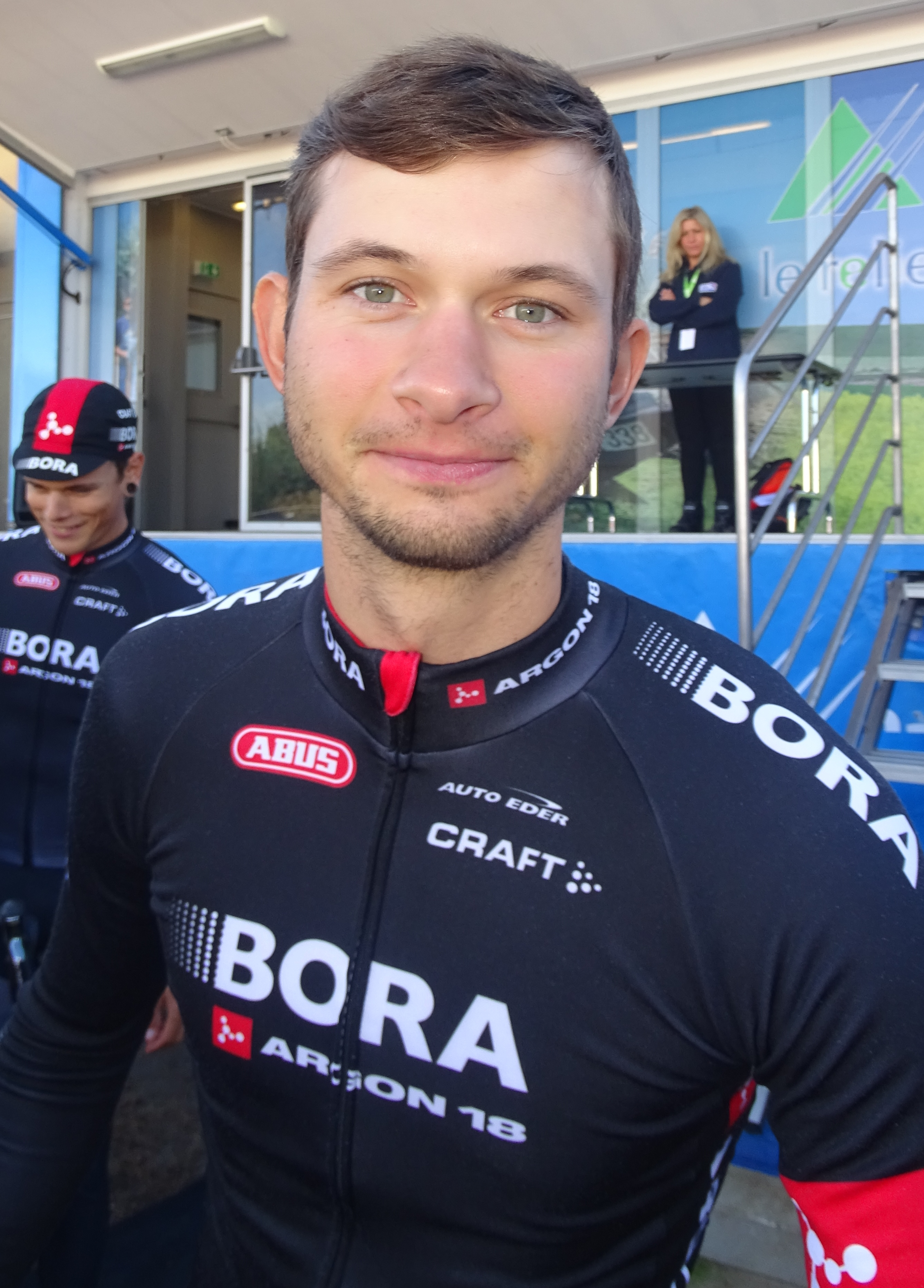 Reportage réalisé le dimanche 20 septembre à l'occasion du départ et de l'arrivée du Grand Prix d'Isbergues 2015 à Isbergues, Nord-Pas-de-Calais, France.